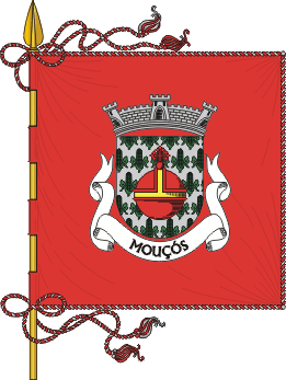 Estandarte da freguesia de Mouçós (concelho de Vila Real)